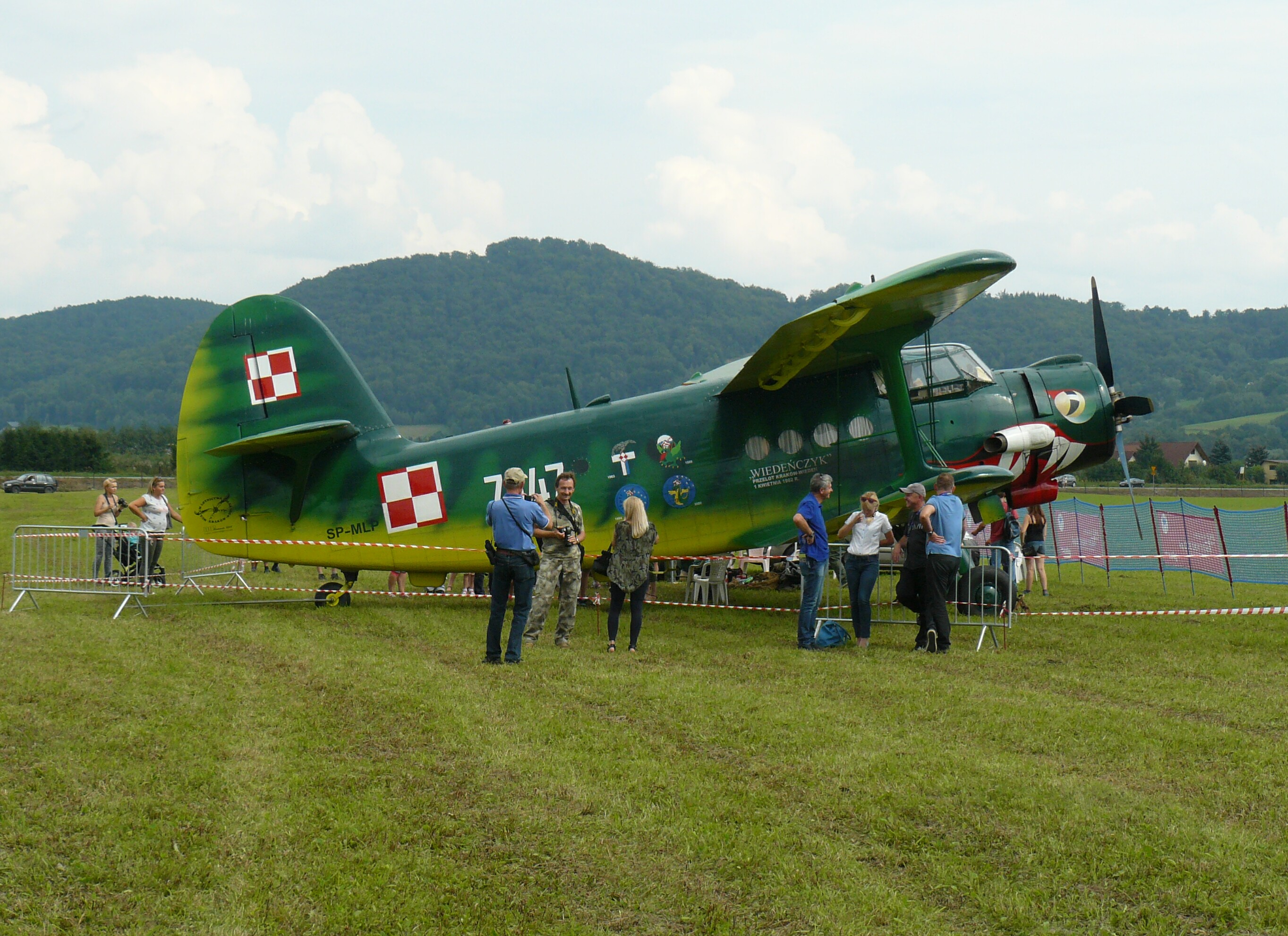 AN-2 TD Wiedeńczyk na festynie lotniczym w Łososinie Dolnej, Aeroklub Podhalański 2016r